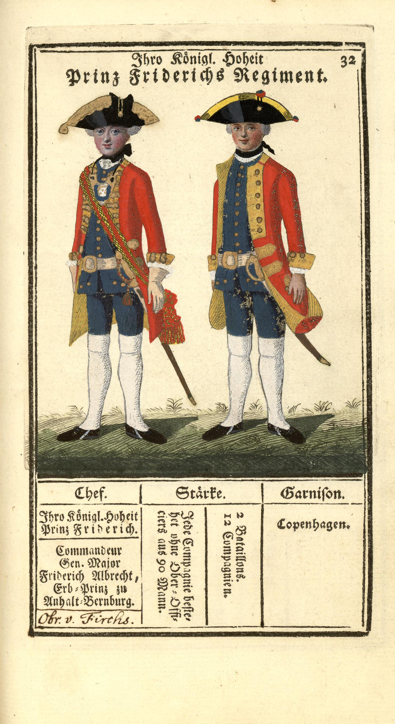 Illustrasjon hentet fra boken "Vorstellung der sämtlichen Königl. Dänischen Armee" av Bertram, Carl og utgitt av Carl Bertram (dk, 1763)